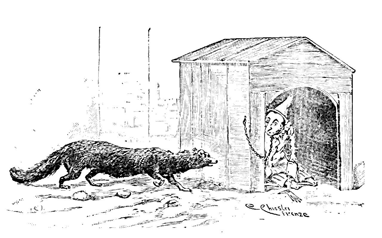 Illustrations from "Le avventure di Pinocchio, storia di un burattino", Carlo Collodi, Bemporad & figlio, Firenze 1902 (Drawings and engravings by Carlo Chiostri, and A. Bongini)